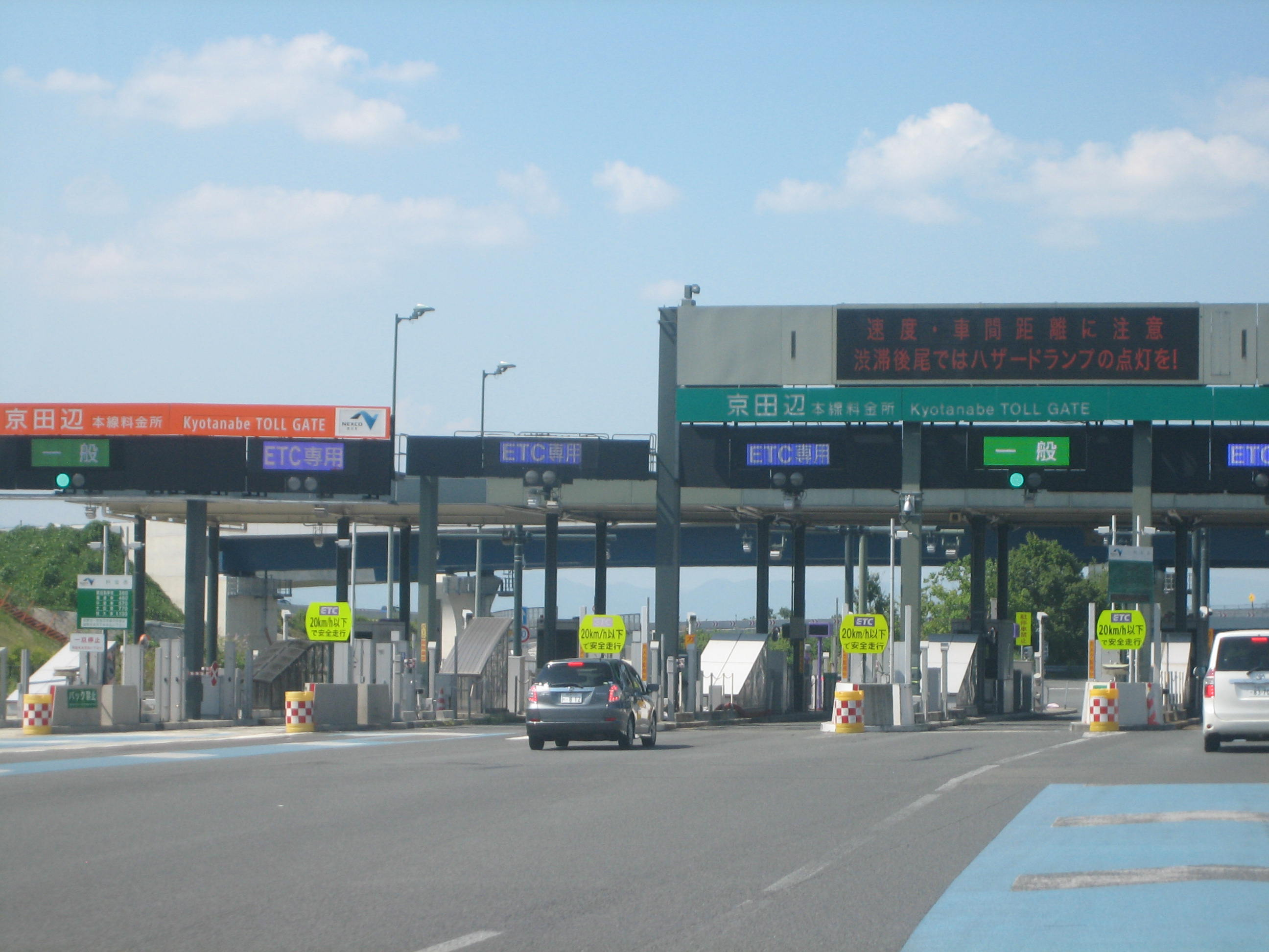 京田辺TB